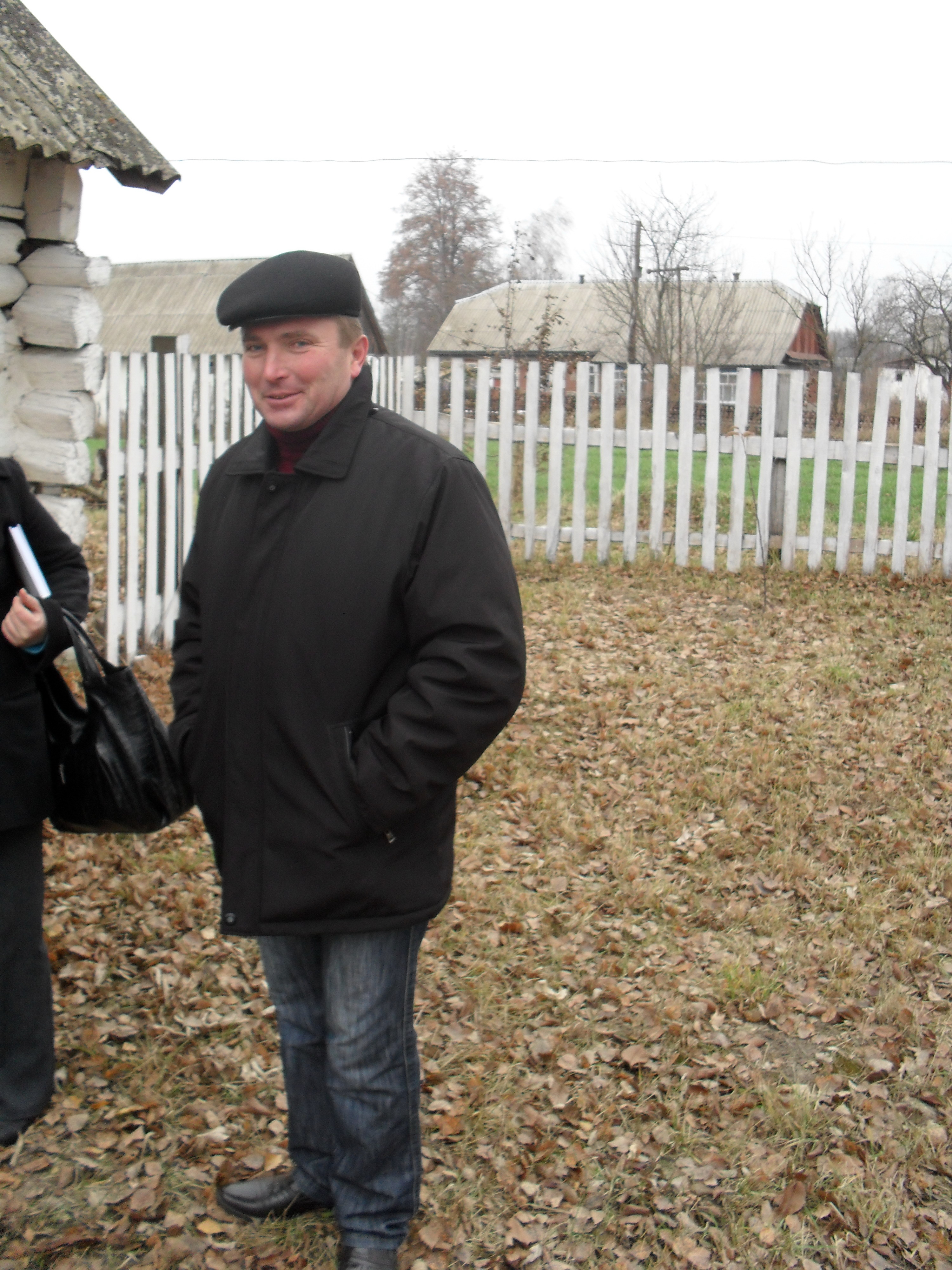 Антонюк Володимир Васильович - Сингаївський сільський голова